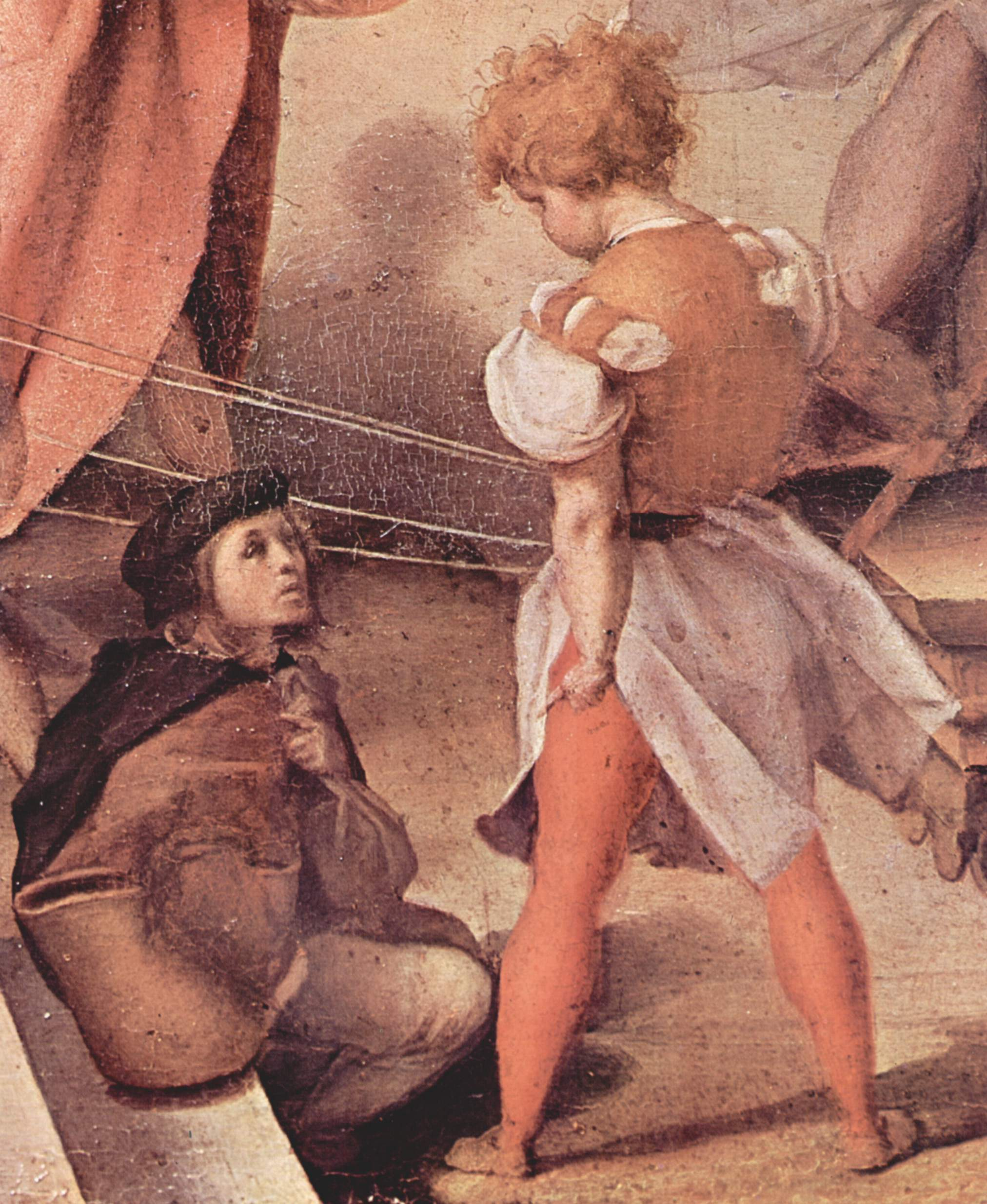 Gemälde für das Hochzeitszimmer des Pier Francesco Borgherini im Familienpalast in Florenz, Szene: Joseph in Ägyptendetail